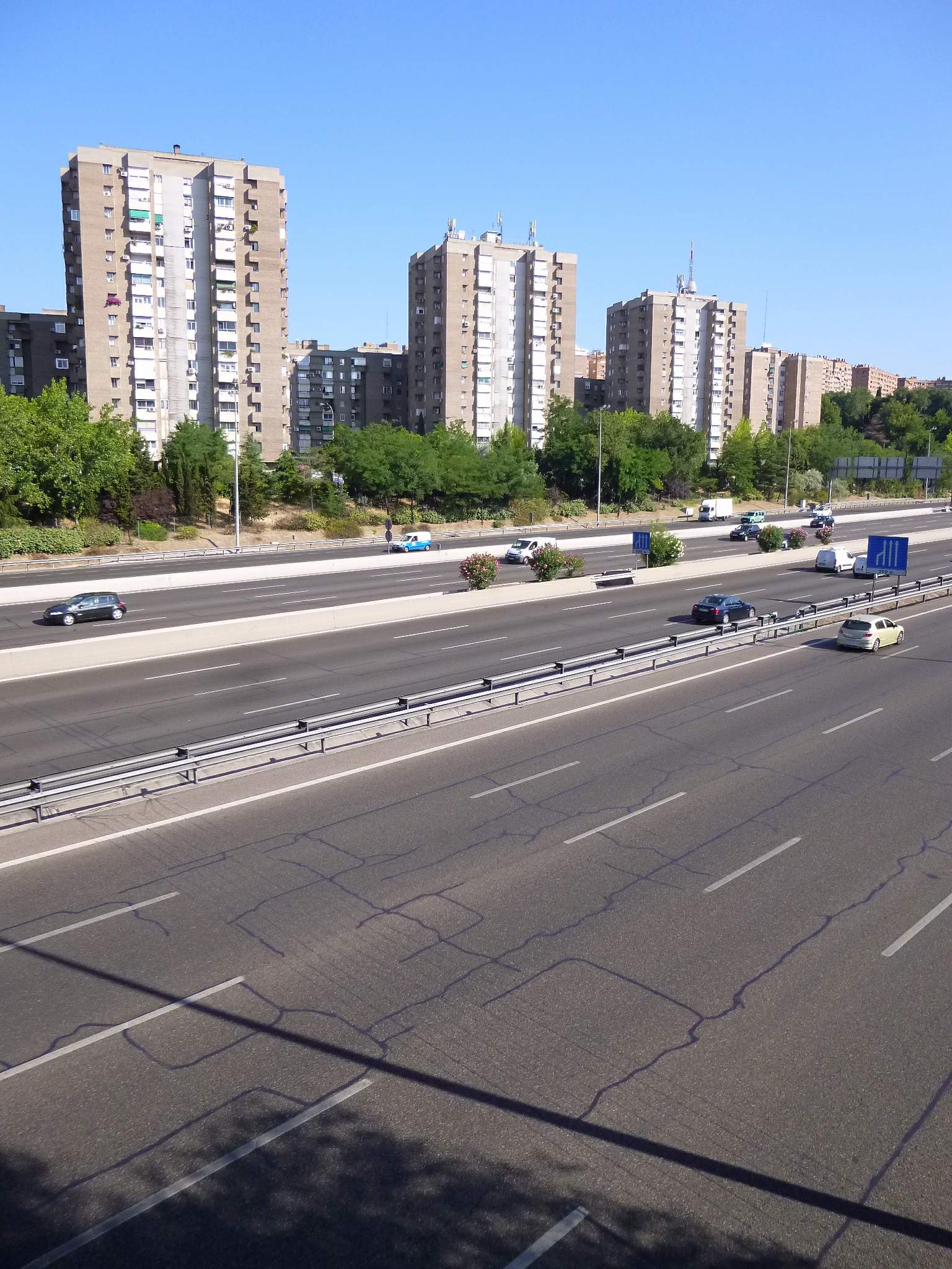 Puente sobre la M-30 entre Moratalaz y Retiro.